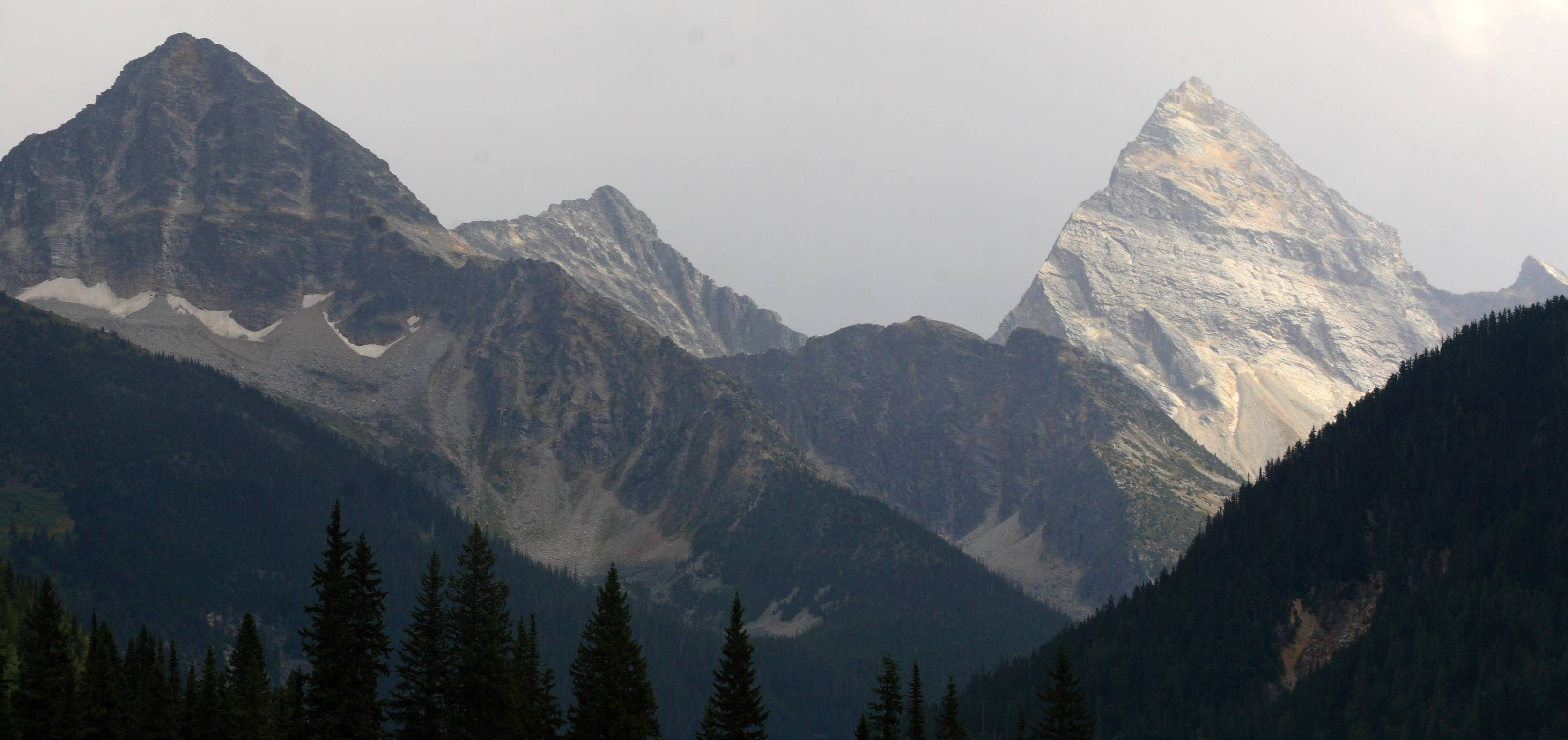 Montagnes du parc national des Glaciers (mont Sir Donald à droite)